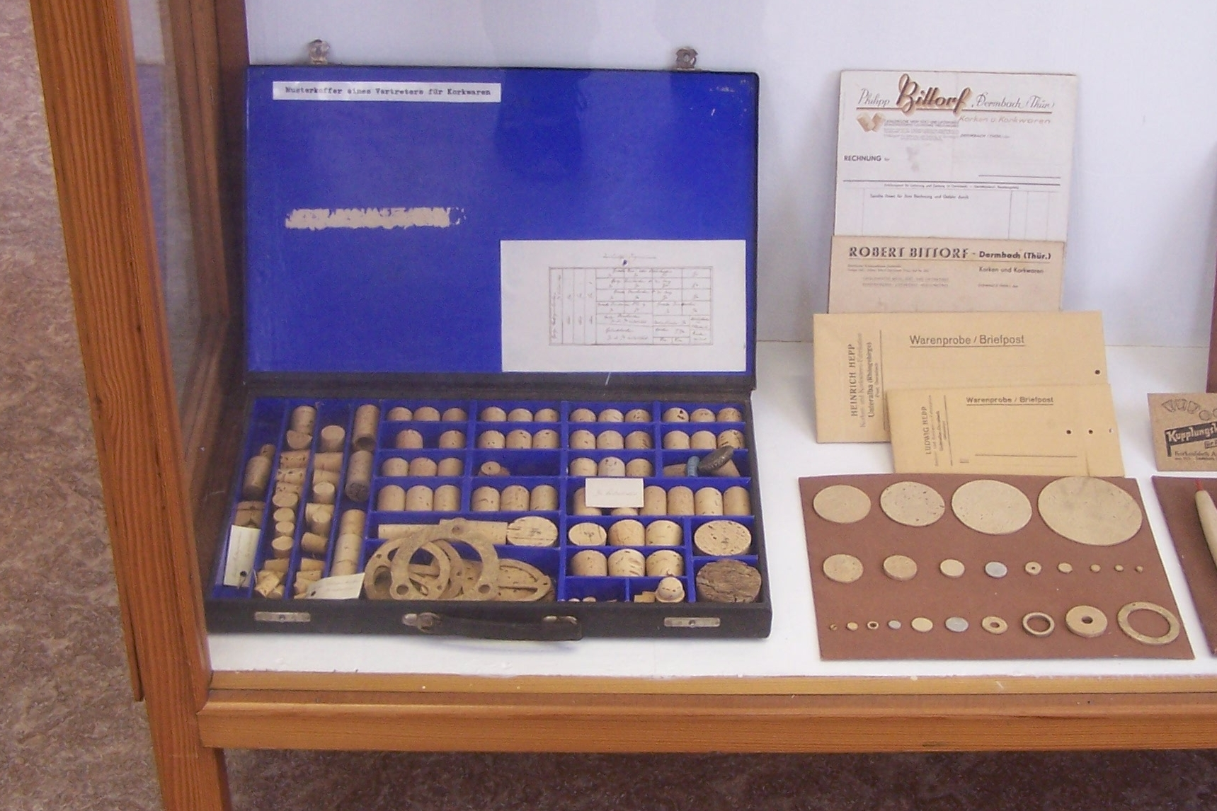 Dermbach